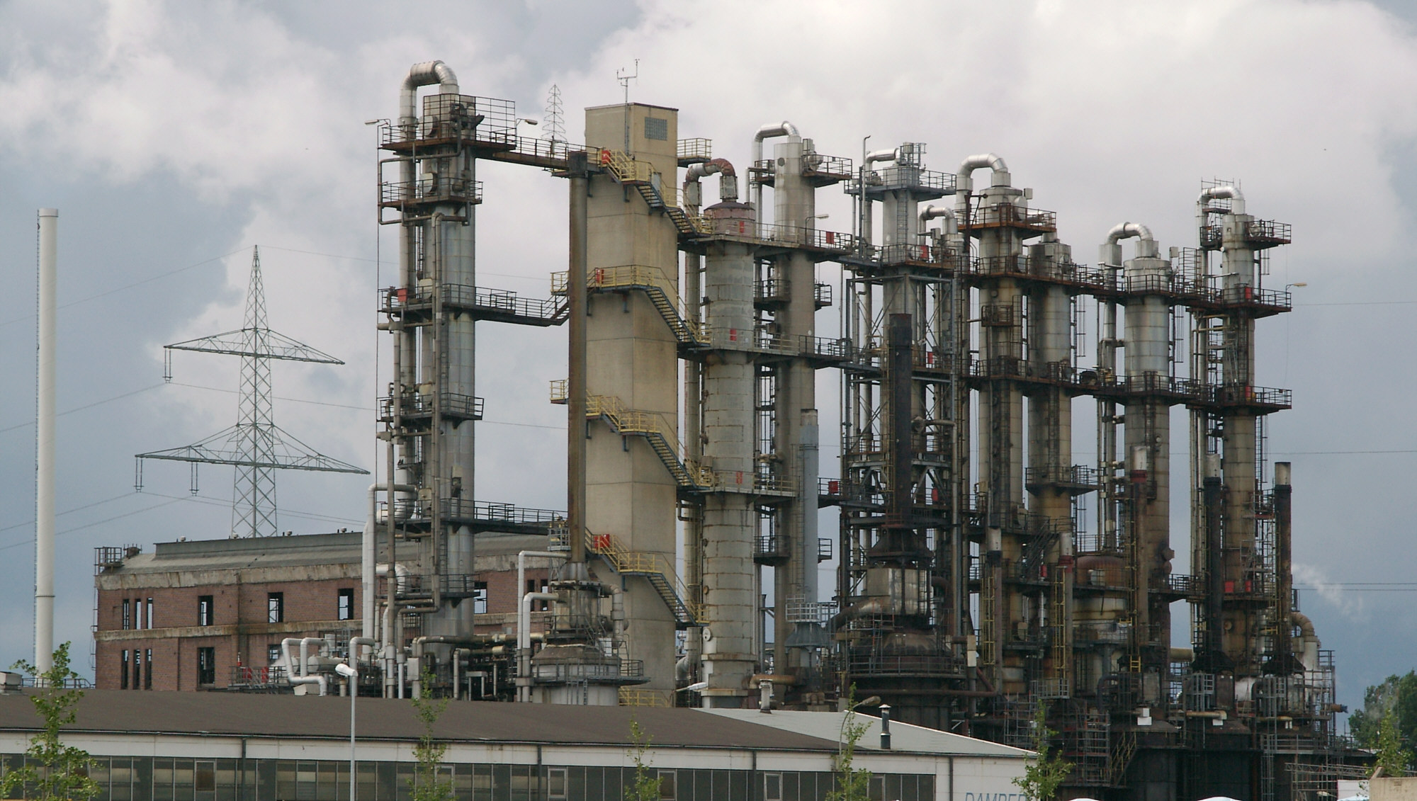 RÜTGERS Chemicals GmbH, Castrop-Rauxel. Verarbeitung von Steinkohlenteer